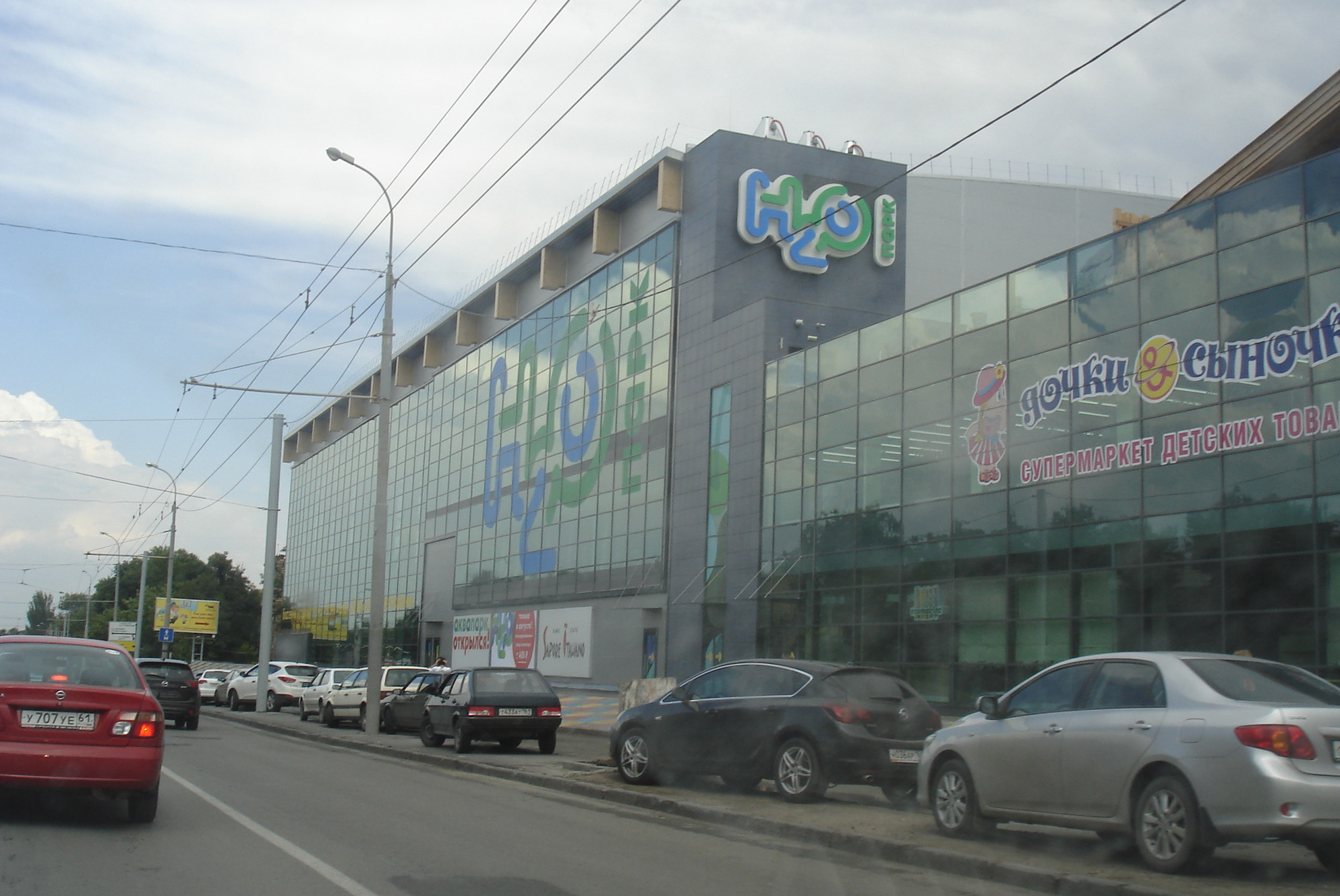 Закрытый аквапарк в Ростове-на-Дону